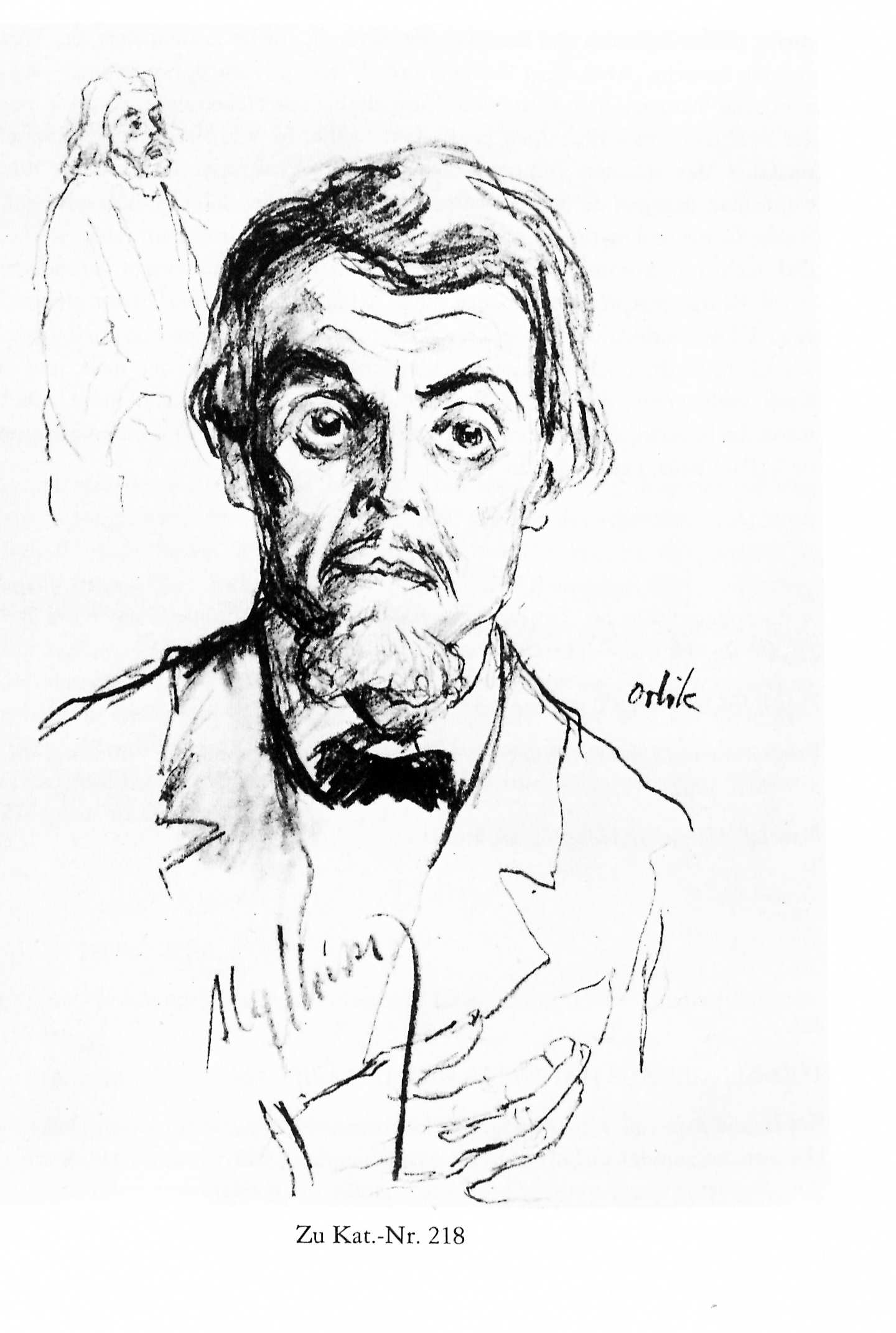 Alexander Moissi als Lehrer Gottwald in Gerhart Hauptmann Hanneles Himmelfahrt. Inszenierung in der Volksbühne Berlin 23. Februar 1918. Zeichnung von Emil Orlik 1918